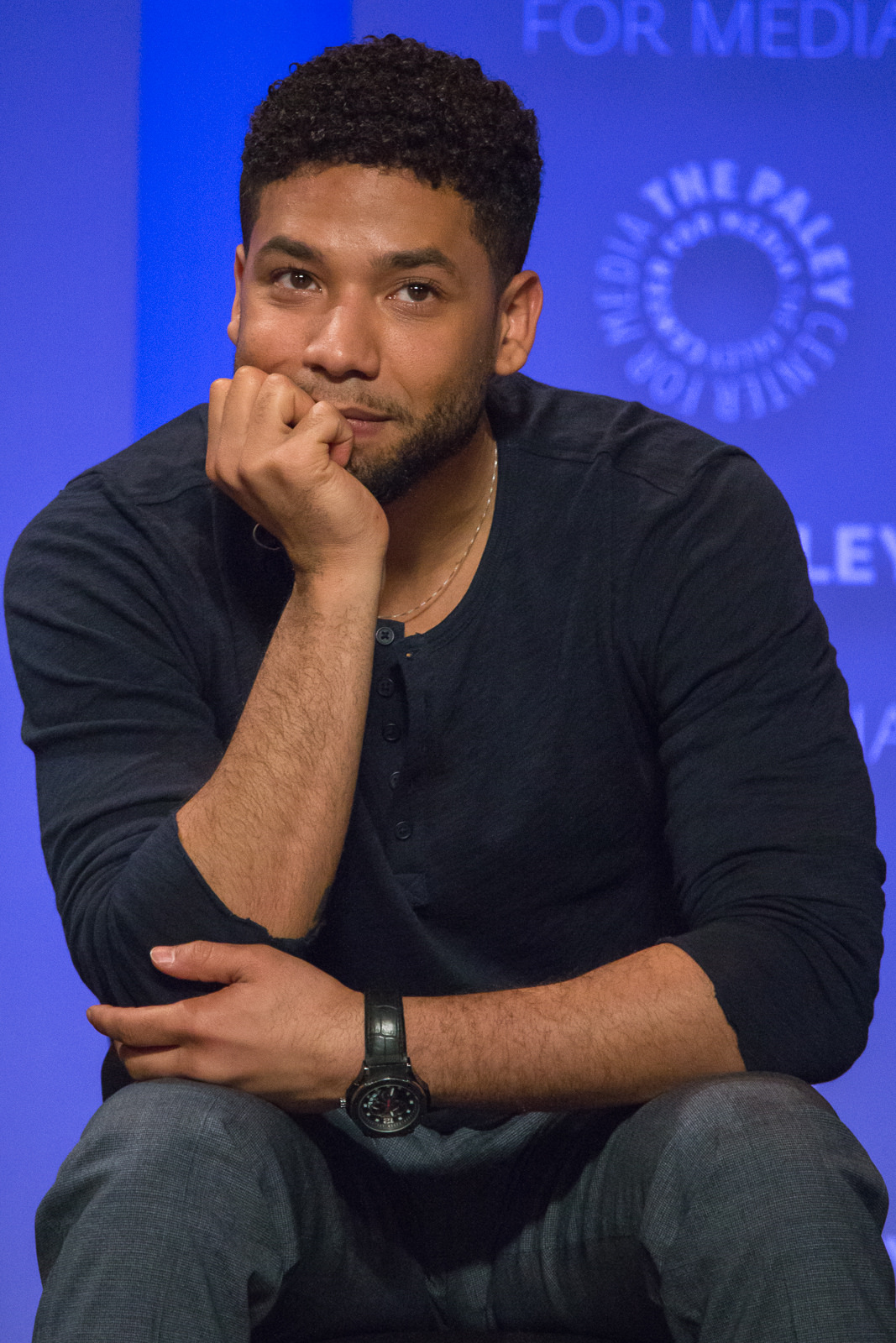 PaleyFest Los Angeles 2016